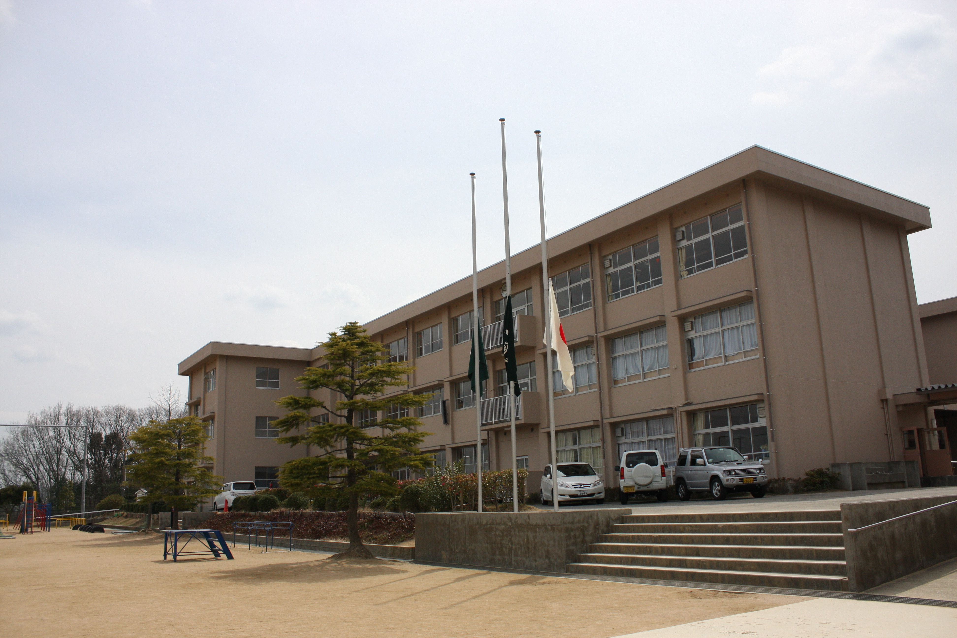 三田市立武庫小学校